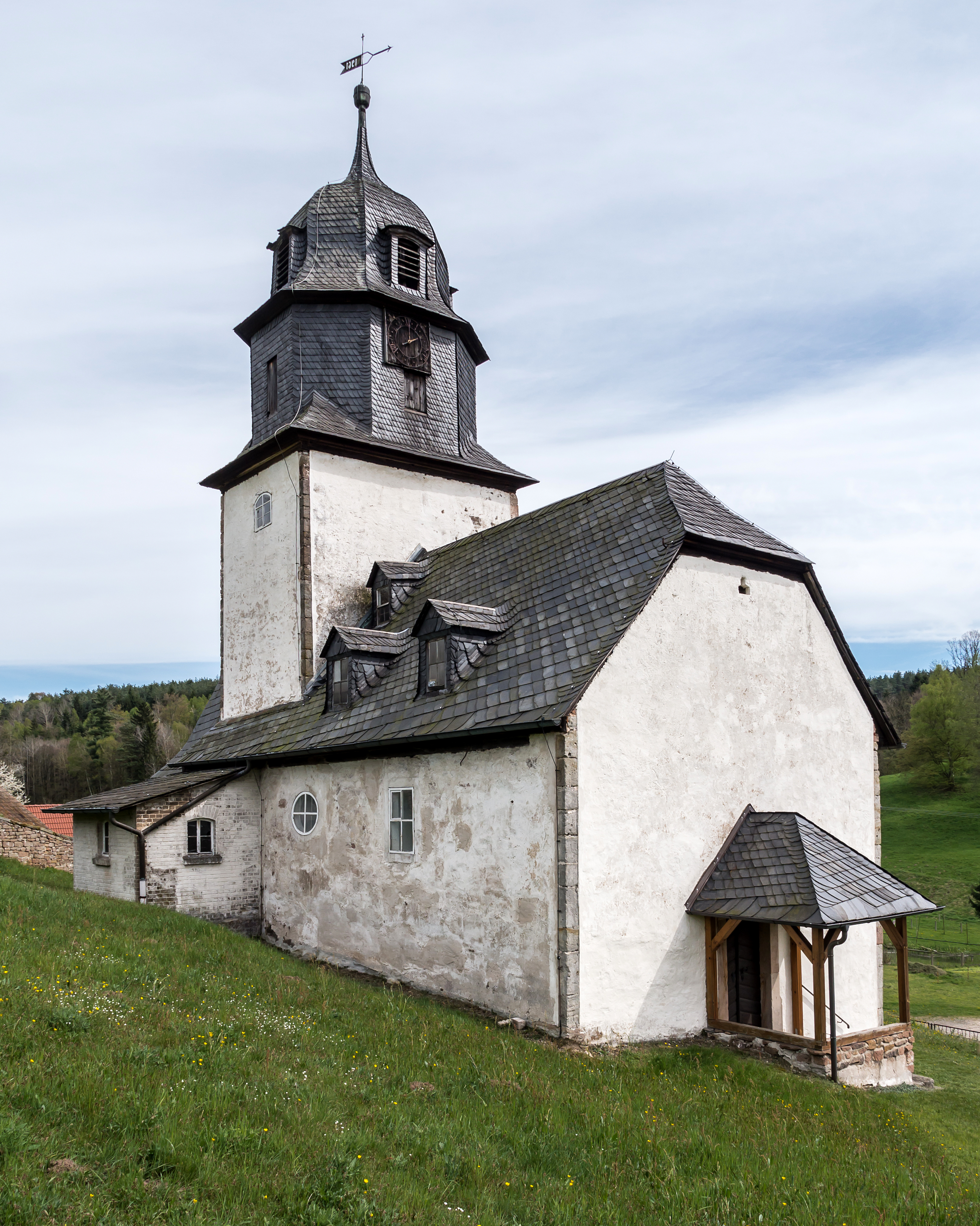 Denkmalgeschützte Kirche Langenschade-Reichenbach Hauptstraße 76, Gemeinde Unterwellenborn